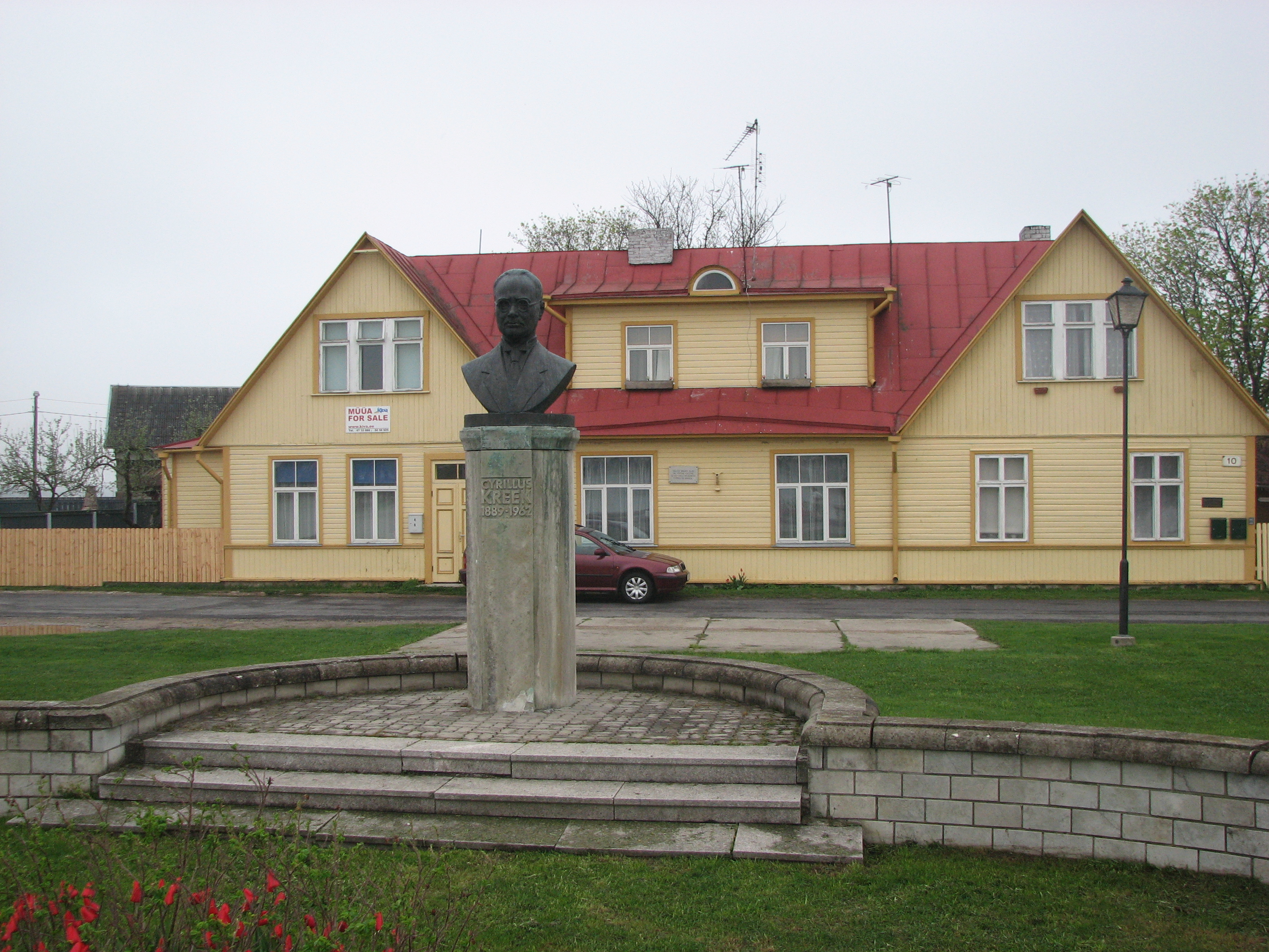 Maja, kus aastail 1939-1962 elas Cyrillus Kreek